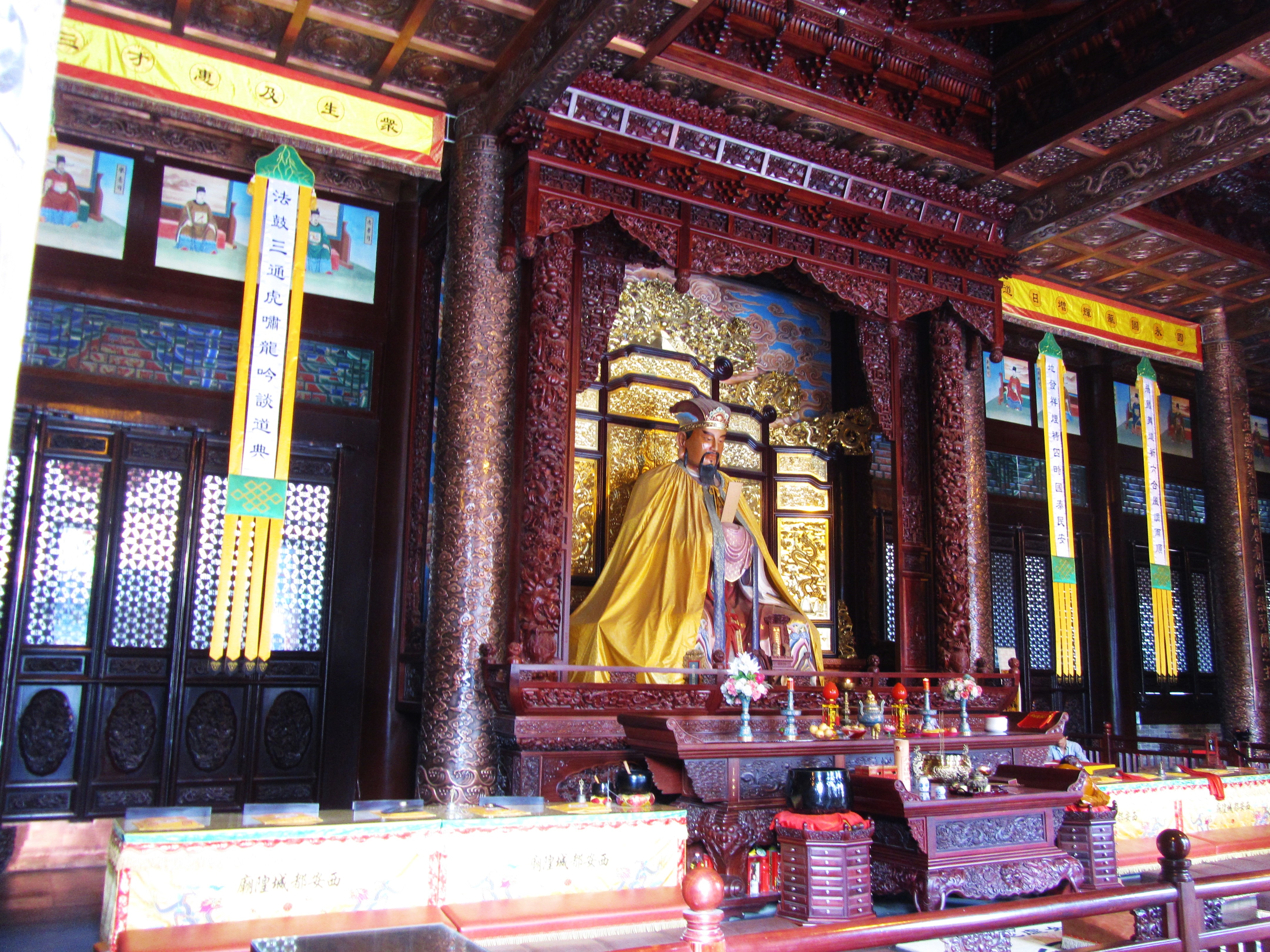 西安都城隍庙，大殿室内。